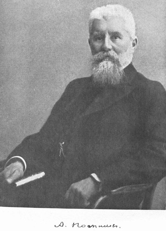 Посников, Александр Сергеевич